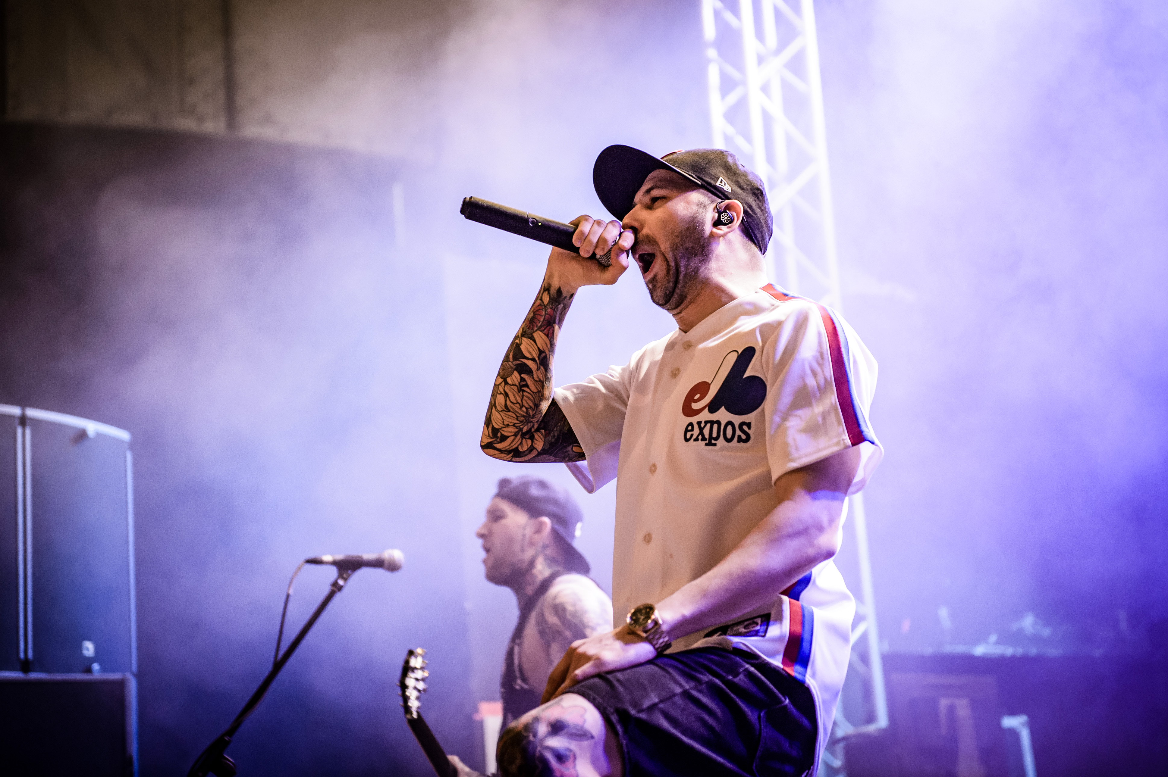 'Impericon Festival 2018; Turbinenhalle Oberhausen': 'Obey the Brave'